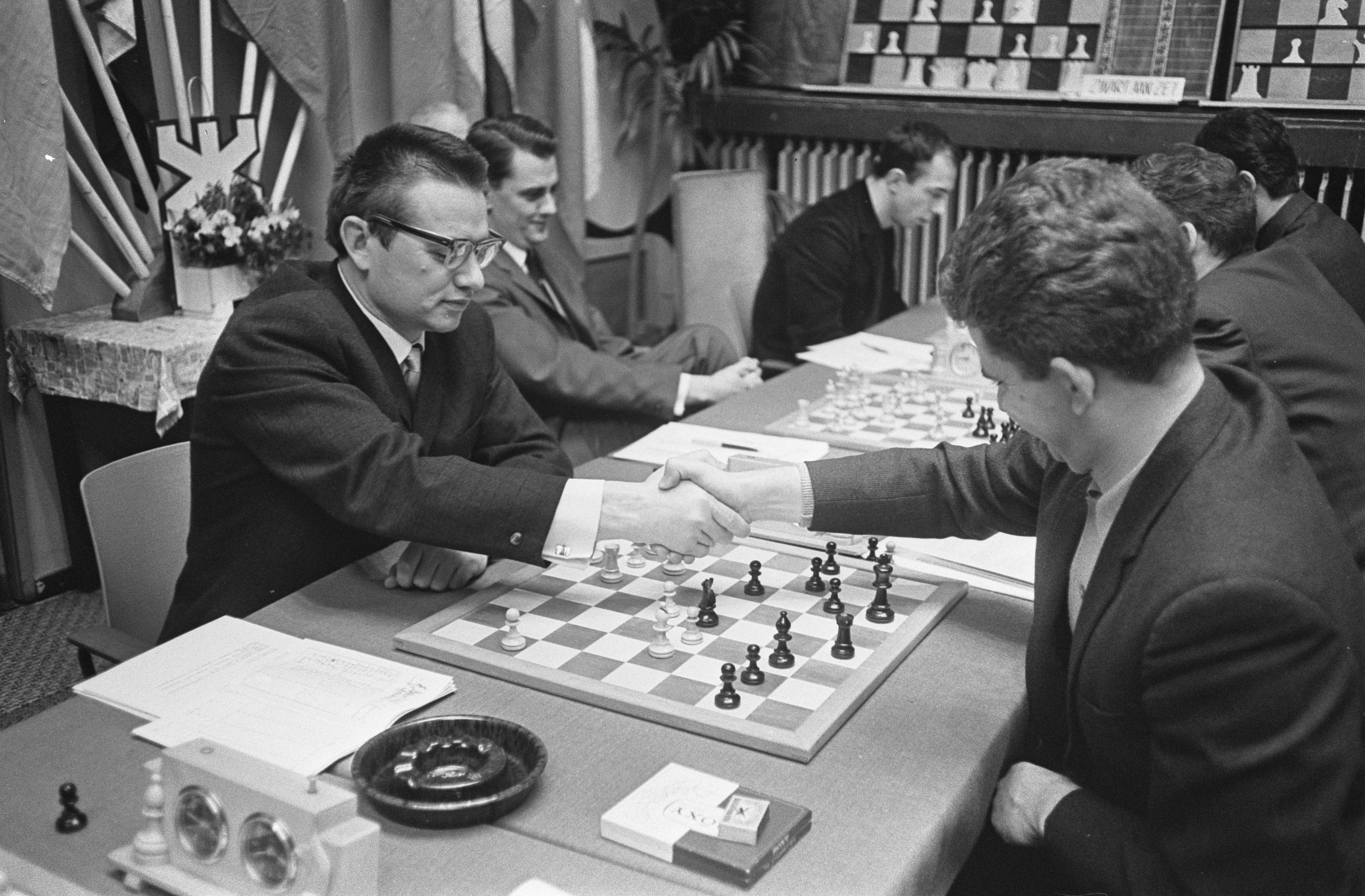 Collectie / Archief : Fotocollectie Anefo Reportage / Serie : [ onbekend ] Beschrijving : Hoogovenschaaktoernooi, de twee leiders, links Loutikow en Sparski Datum : 18 januari 1967 Trefwoorden : schaken Instellingsnaam : Hoogovenschaaktoernooi Fotograaf : Koch, Eric / Anefo Auteursrechthebbende : Nationaal Archief Materiaalsoort : Negatief (zwart/wit) Nummer archiefinventaris : bekijk toegang 2.24.01.05 Bestanddeelnummer : 919-9969